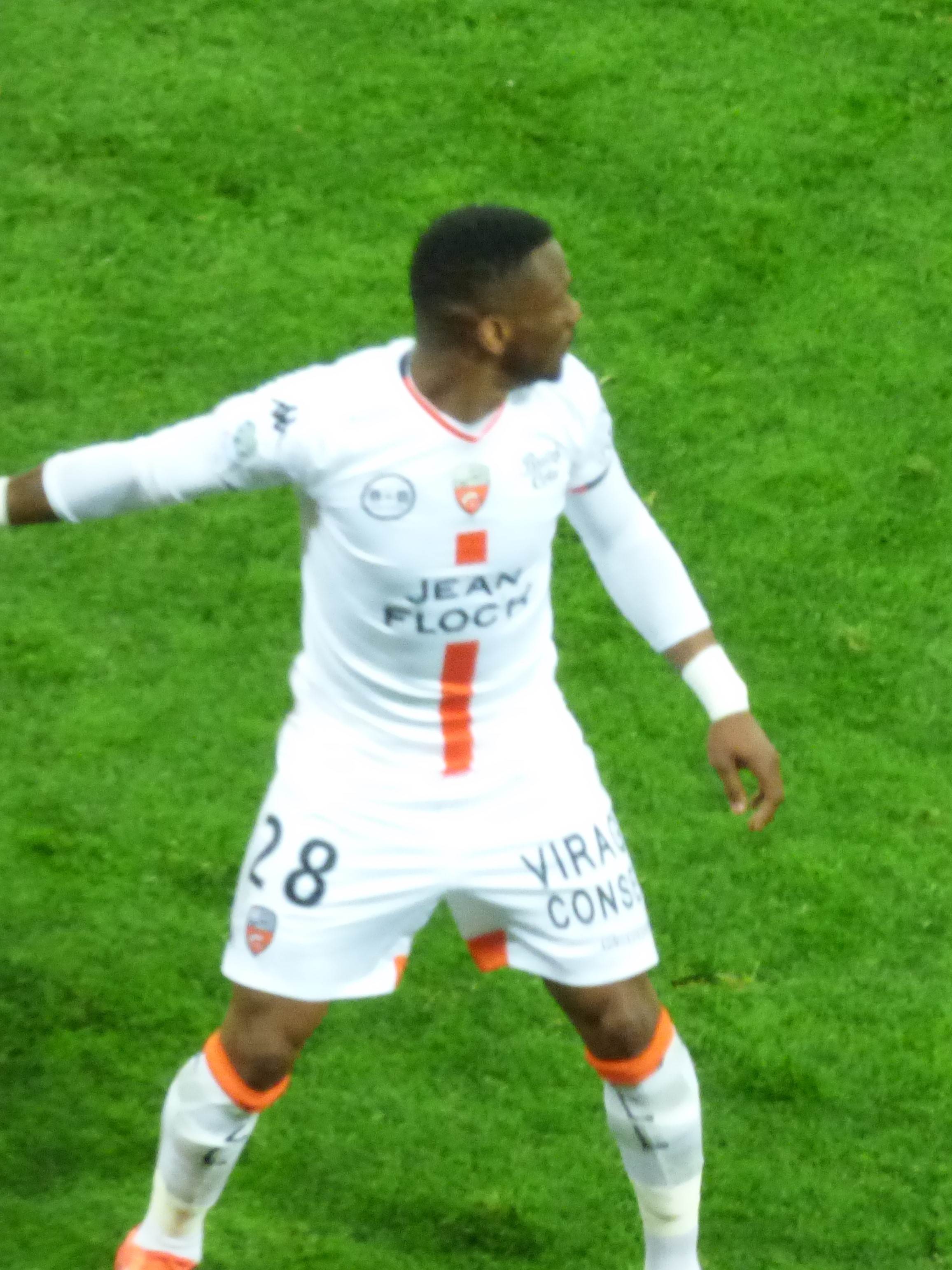 Wilfried Ebane pendant le match RC Lens / FC Lorient, comptant pour la 34ème journée du championnat de France de Ligue 2 de football 2018-2019, le 23 avril 2019, au Stade Bollaert-Delelis.